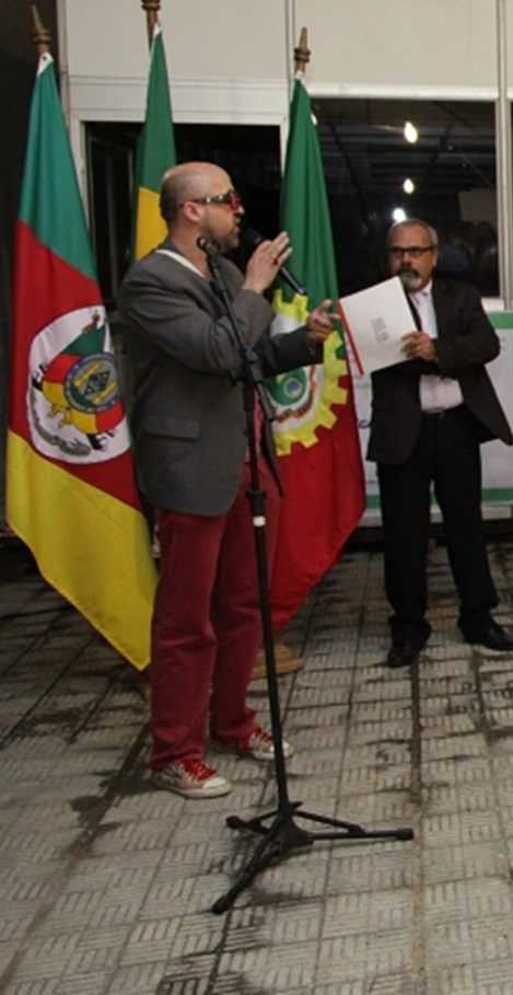 O poeta e cronista brasileiro (Rio Grande do Sul) Fabrício Carpinejar, discursa na abertura da Feira do Livro de Canoas, RS.